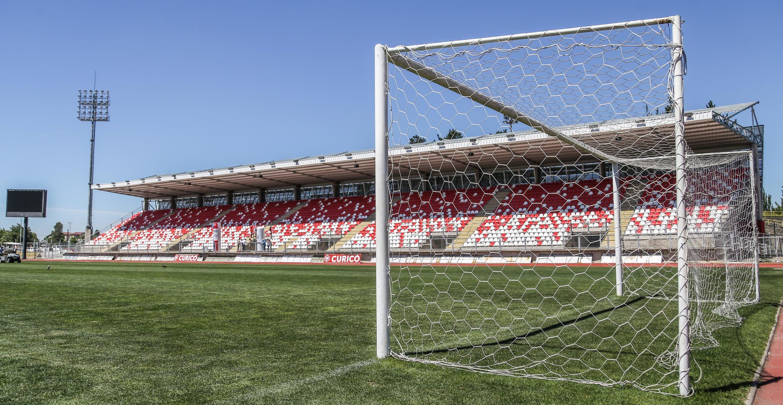 Estadio La Granja, sector Tribuna Andes remodelada